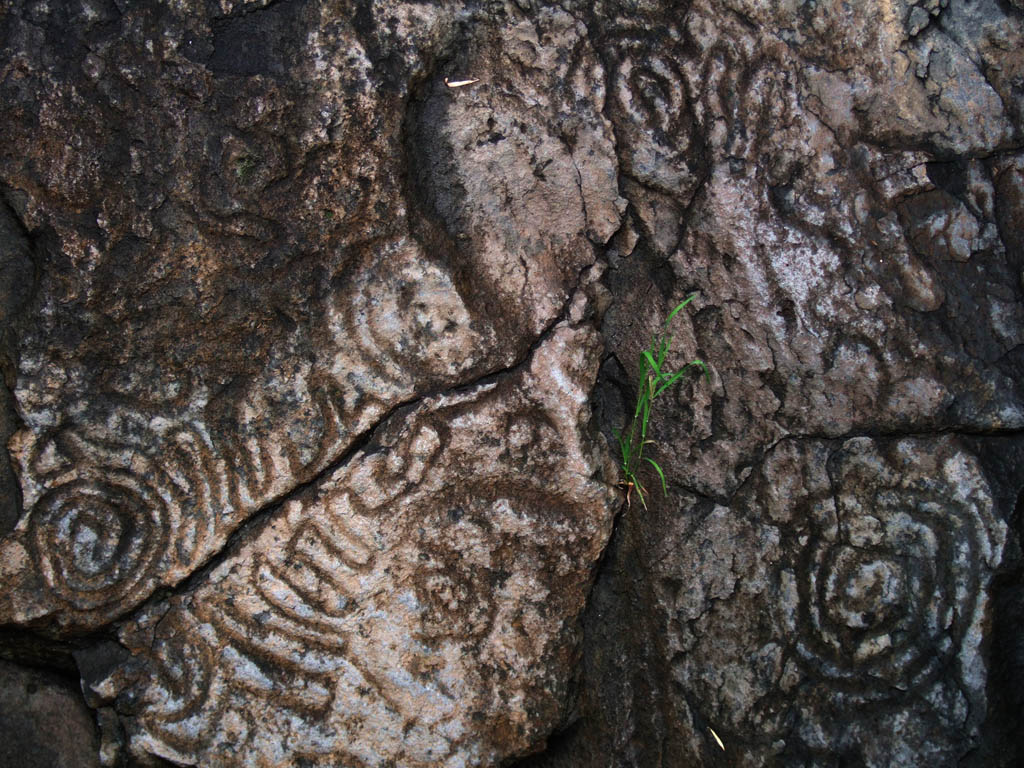 Cueva de Belmaco, Petroglyphen